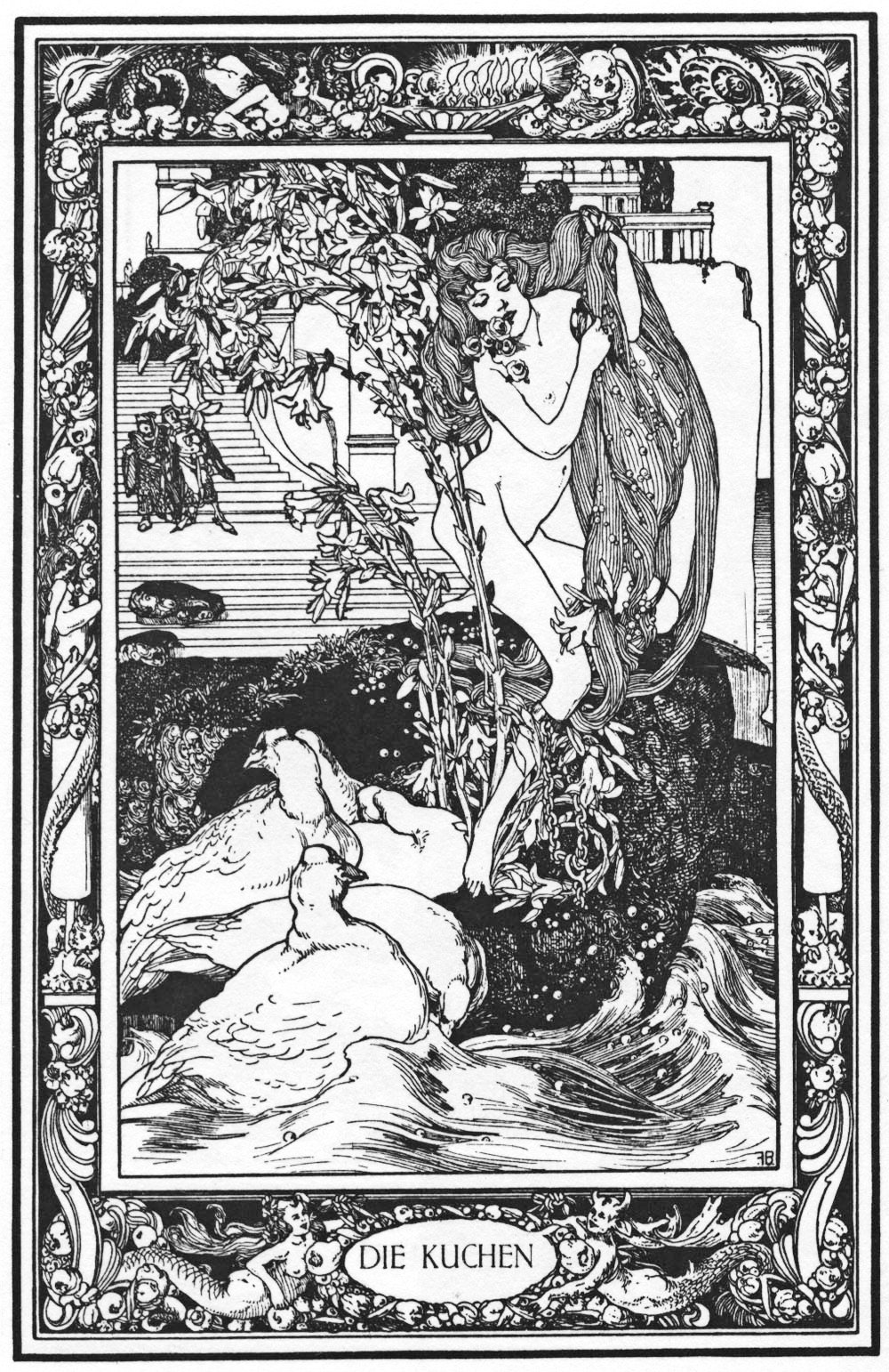 Illustration for Giambattista Basile's "Pentamerone".